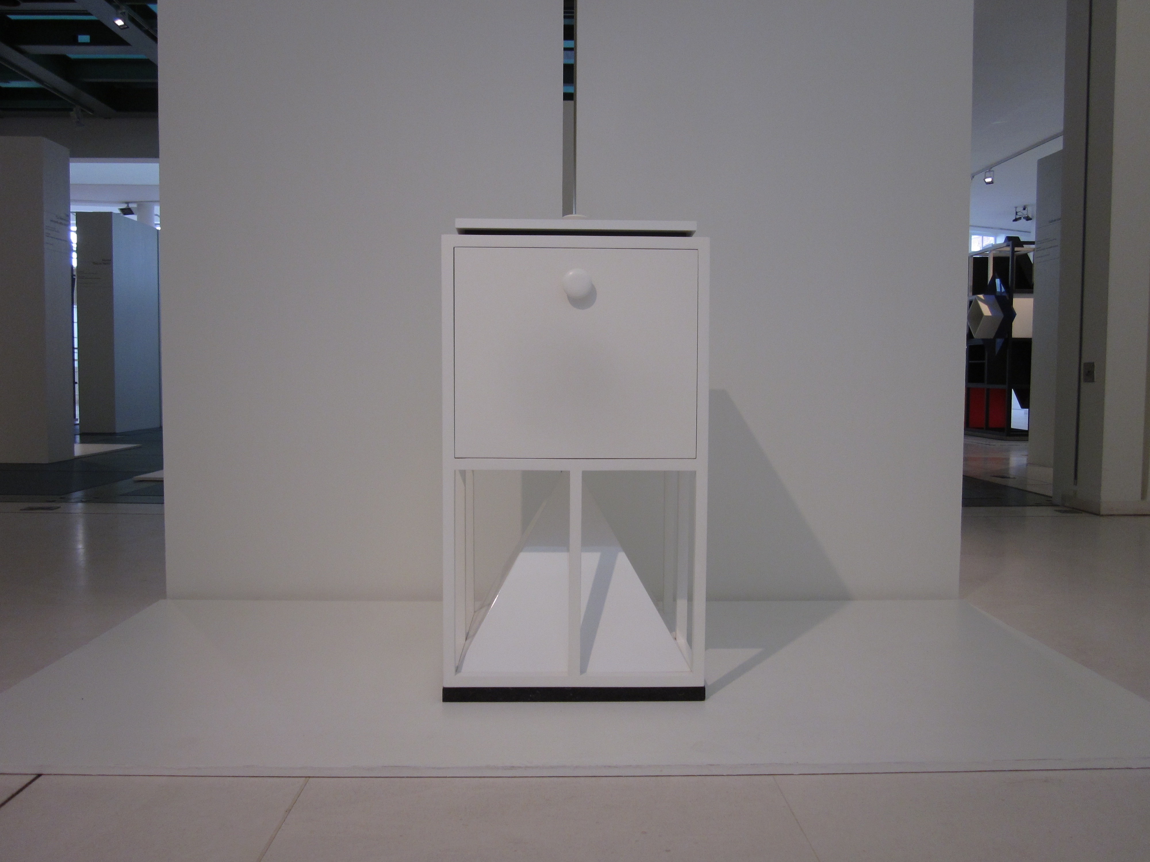 Kast ontworpen te Aboe Simbel 1974 - Tentoonstelling "Pieter De Bruyne Pionier van het postmoderne" Design Museum Gent 2012